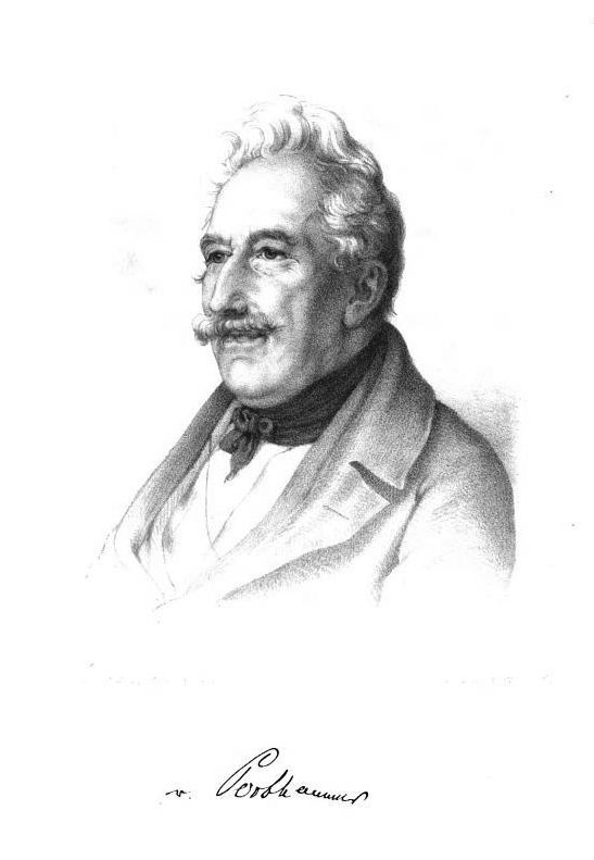 Wilhelm von Pochhammer, Porträt mit Signatur